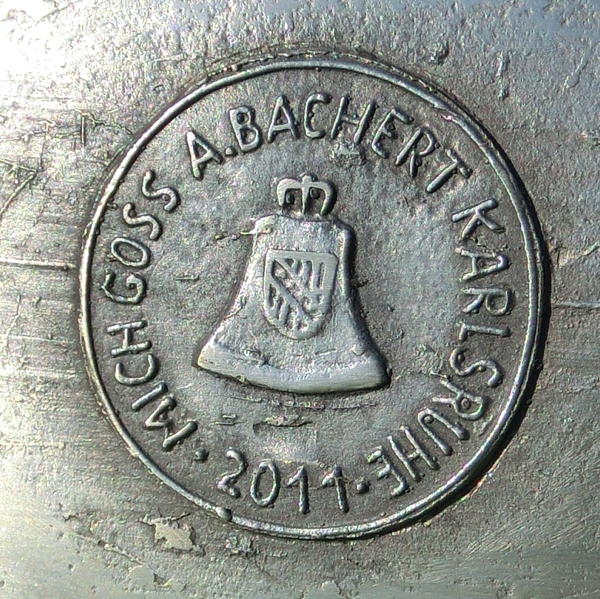 Bad Doberan Münster Glockenankunft